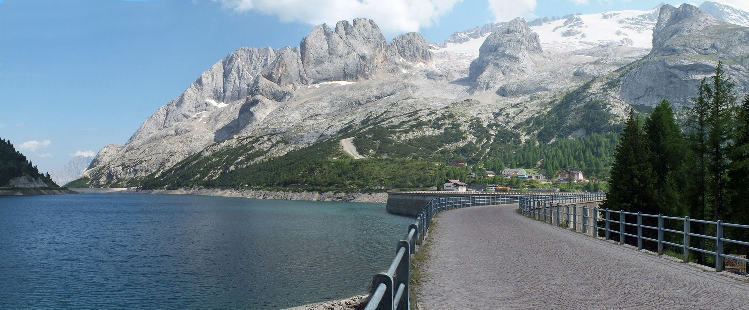 Der Fedaia-Stausee vor dem vergletscherten Nordhang der Marmolata, mit der befahrbaren Hauptstaumauer im Vordergrund und dem Schüttdamm links hinten.